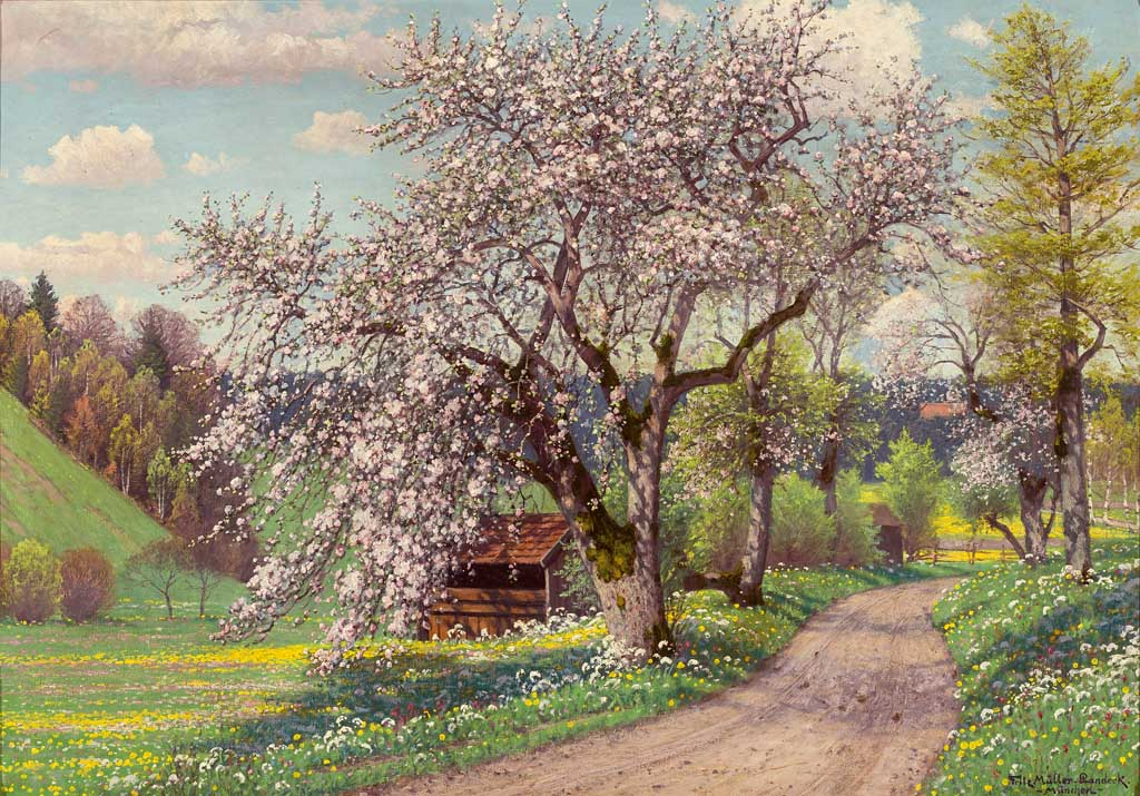 Maimorgen im Chiemgau (laut rückseitigem Titel). Öl auf Leinwand, 70 x 100 cm, signiert und ortsbezeichnet München